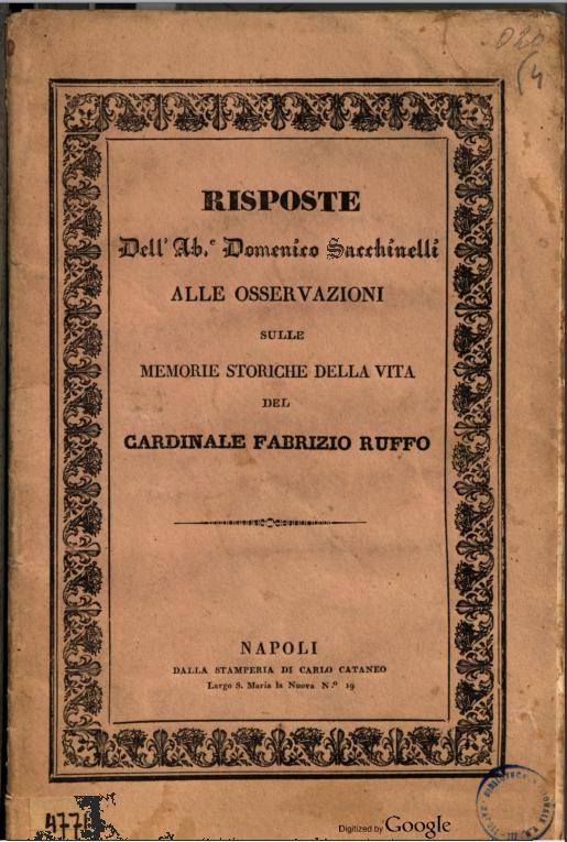 Risposte dell'Abate Domenico Sachinelli alle osservazioni sulle memorie storiche della vita del cardinale Fabrizio Ruffo (Frontespizio)